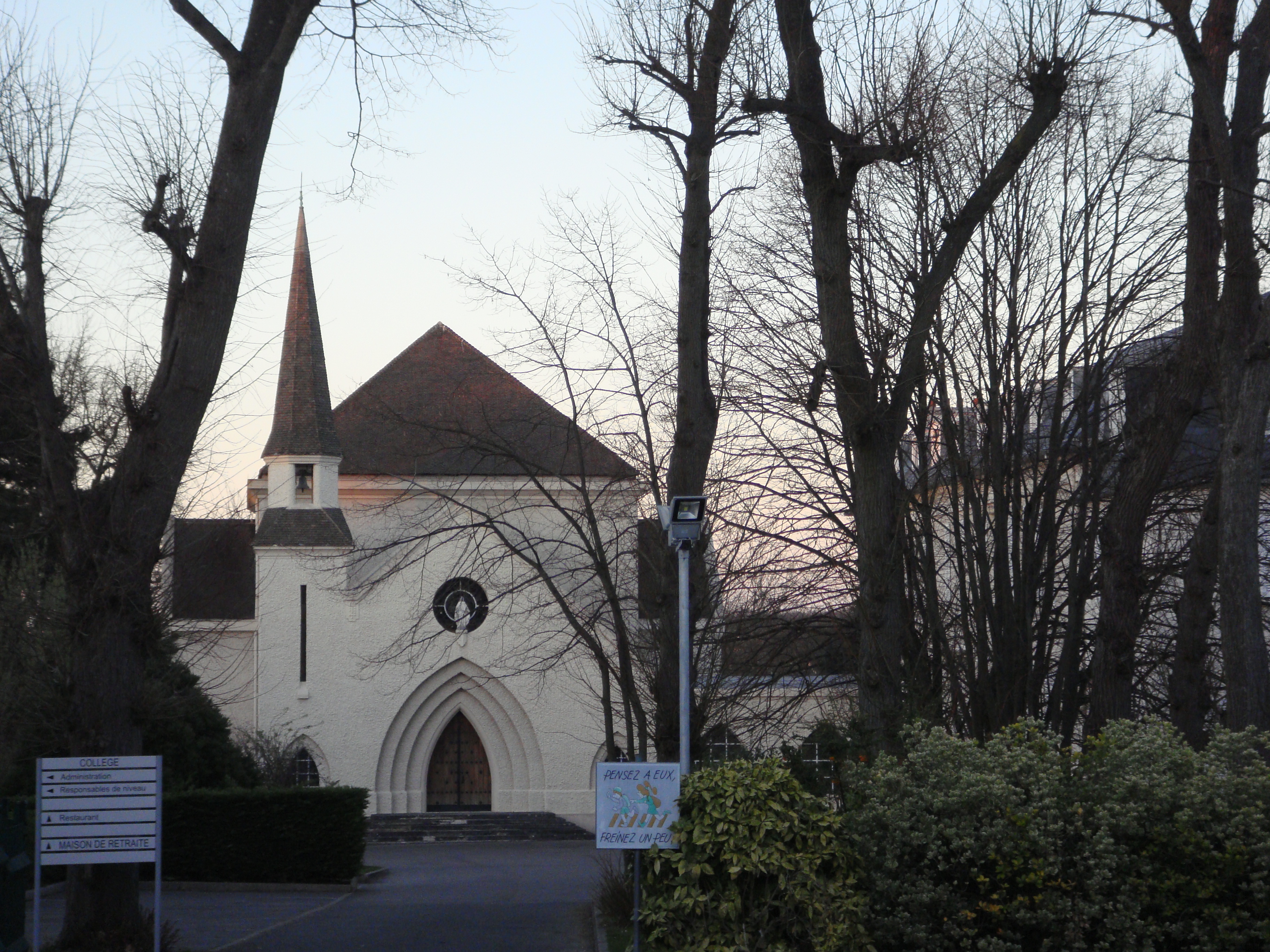 Chapelle de l'Institution Sainte-Thérese (château des prés) à Montgeron